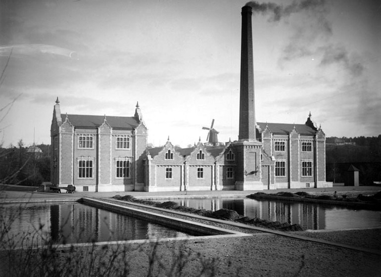 Eriksdals vattenverk i Stockholm